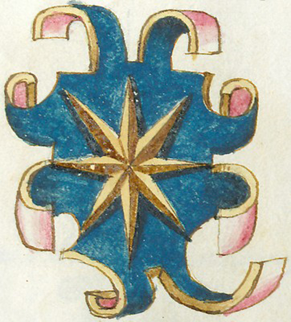 Brasão Nadal do Vêneto